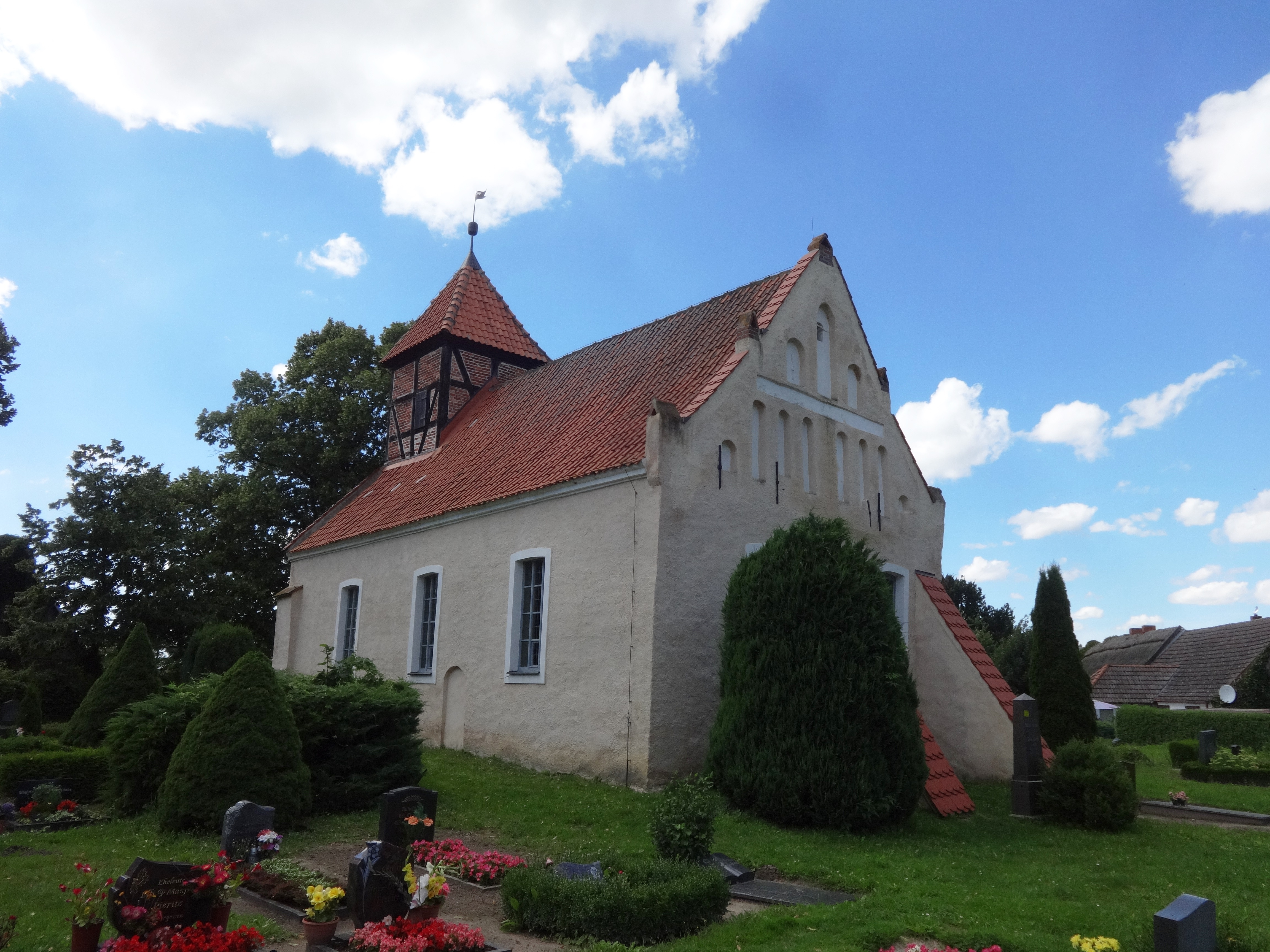 Die Kirche in Bugewitz ist ein Sakralbau aus dem 15. Jahrhundert in Vorpommern. Im Innenraum steht unter anderem eine Grünberg-Orgel aus dem Jahr 1886.